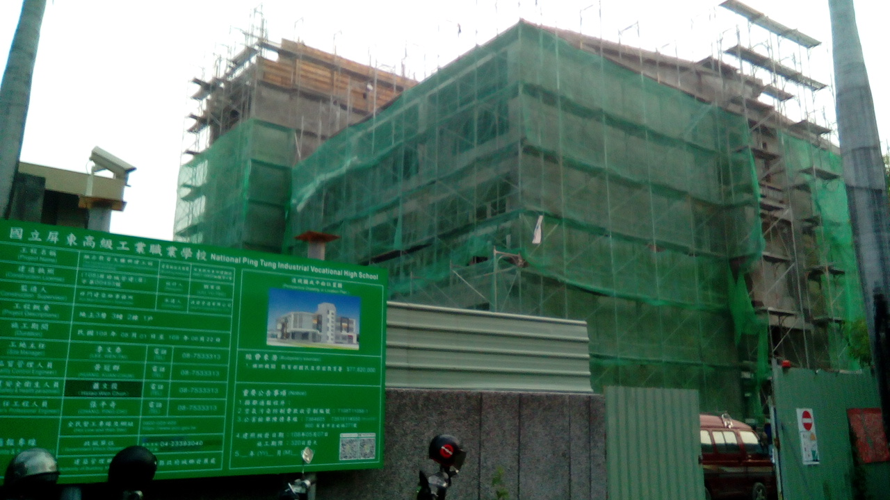 同上